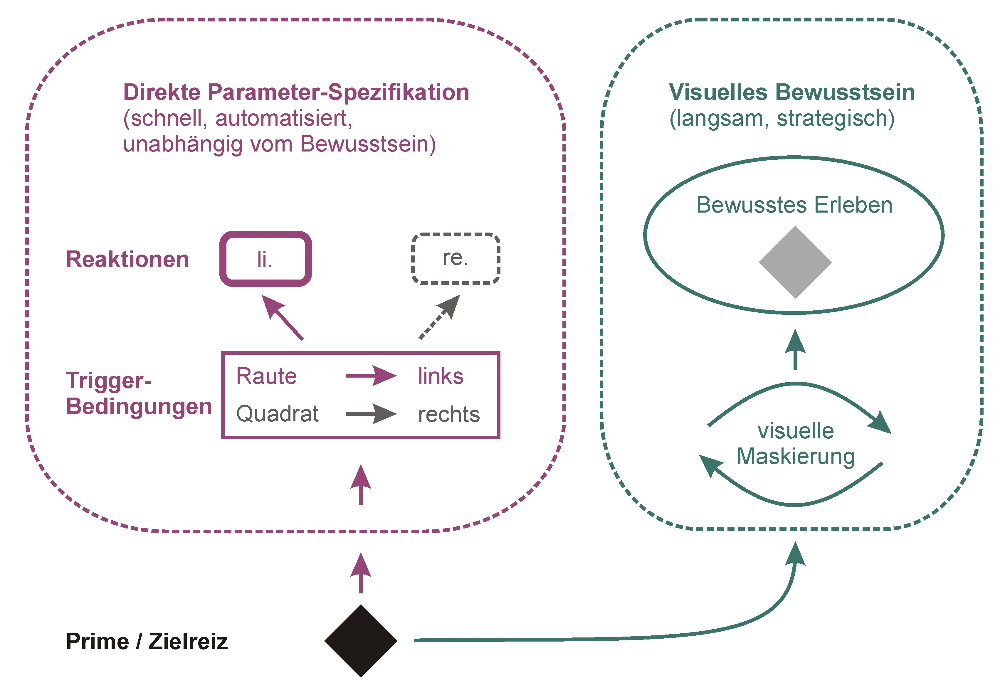 Erklärung zur direkten Parameter Spezifikation